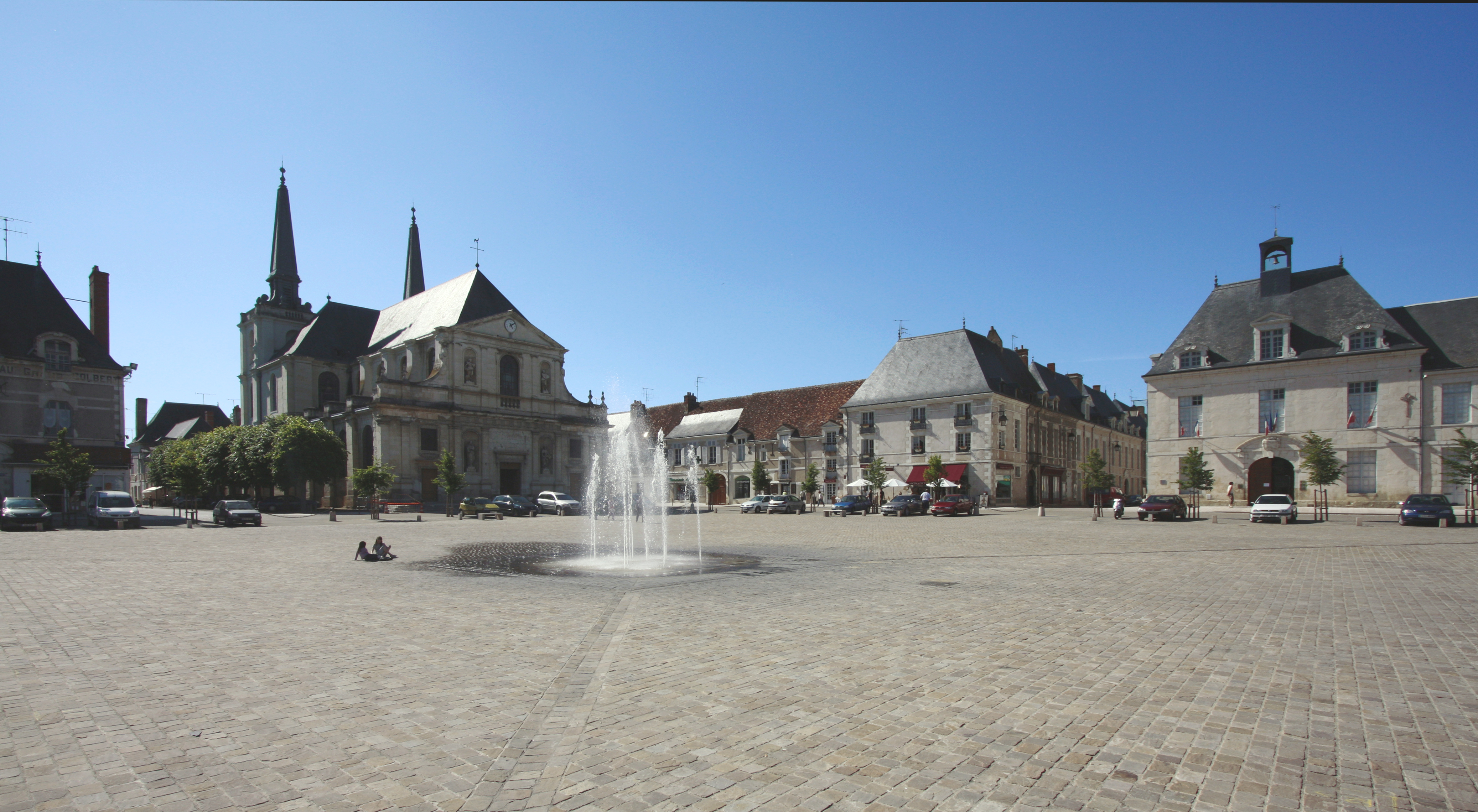 Richelieu, Stadt im Département Indre-et-Loire/Frankreich - Place Cardinale (heute: Place des Halles et de l'Eglise), eigentliches Zentrum der Stadt: zur Rechten das alte Rathaus, zur Linken die Kirche Notre Dame von Richelieu.